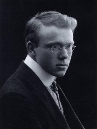 Walter Braunfels en 1902, pendant ses études.